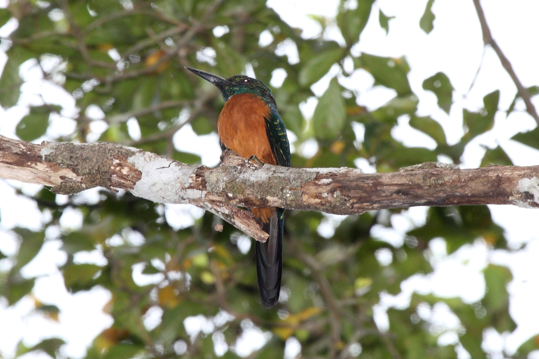 Great Jacamar (Jacamerops aureus). Taken in Panama.